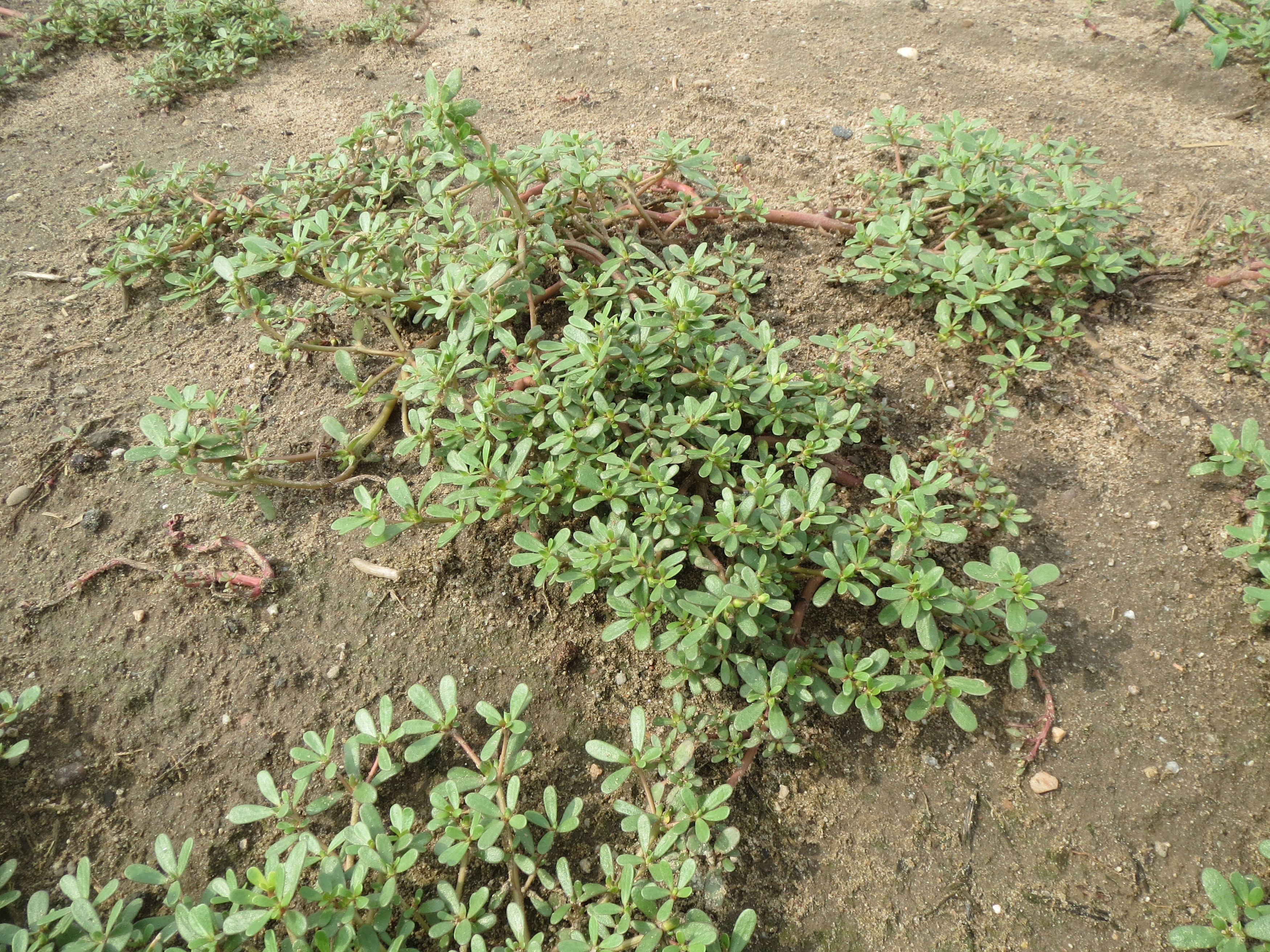 Portulak (Portulaca oleracea) bei Reilingen